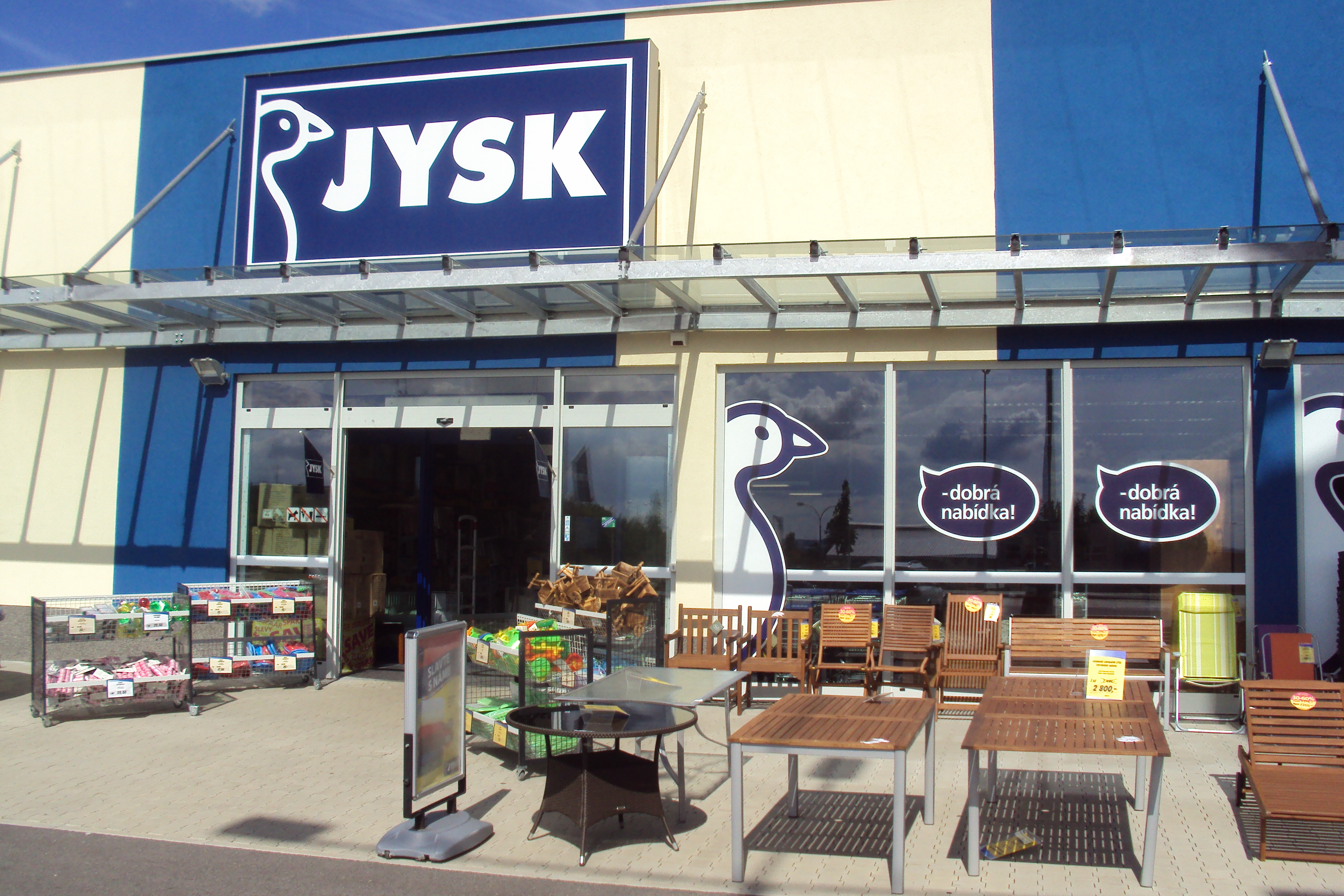 Vchod do nové velkoprodejny JYSK v České Lípě, sídliště Špičák